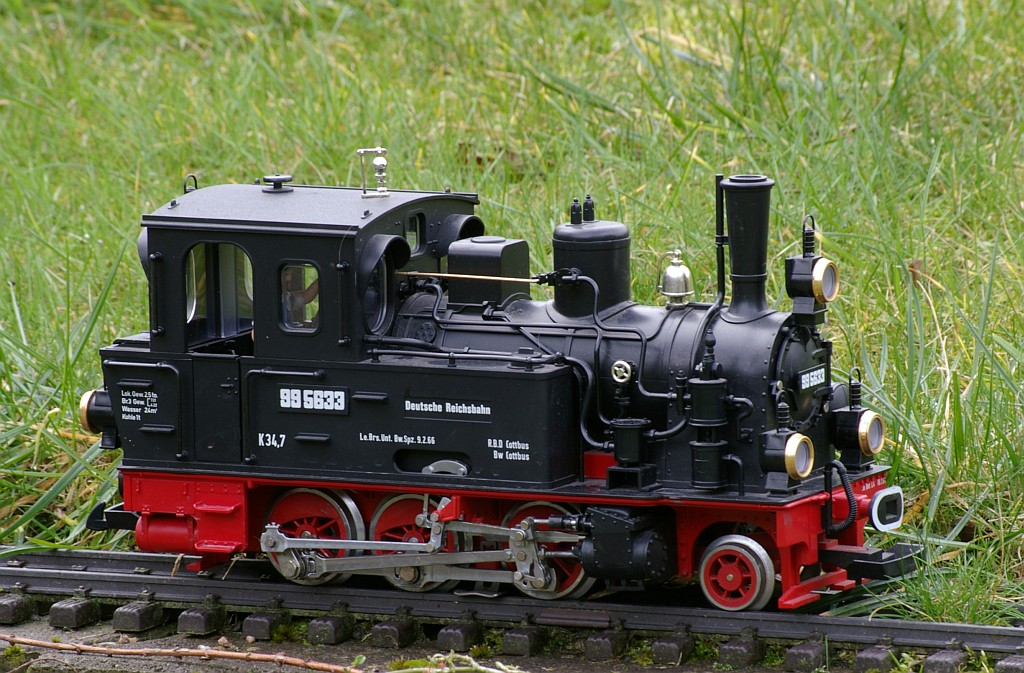 LGB-Dampflok "Spreewald" in der schwarzen Ausführung. Für Informationen zur Original-Lok